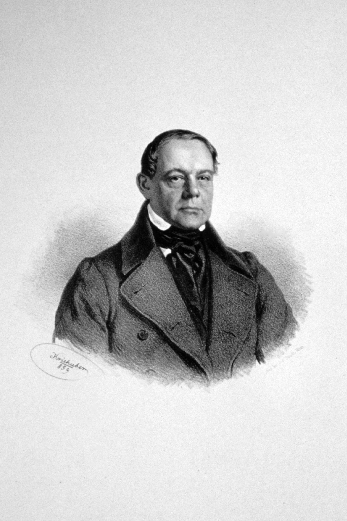 Ignaz Bösendorfer (1796-1859), österreichischer Klavierbauer.